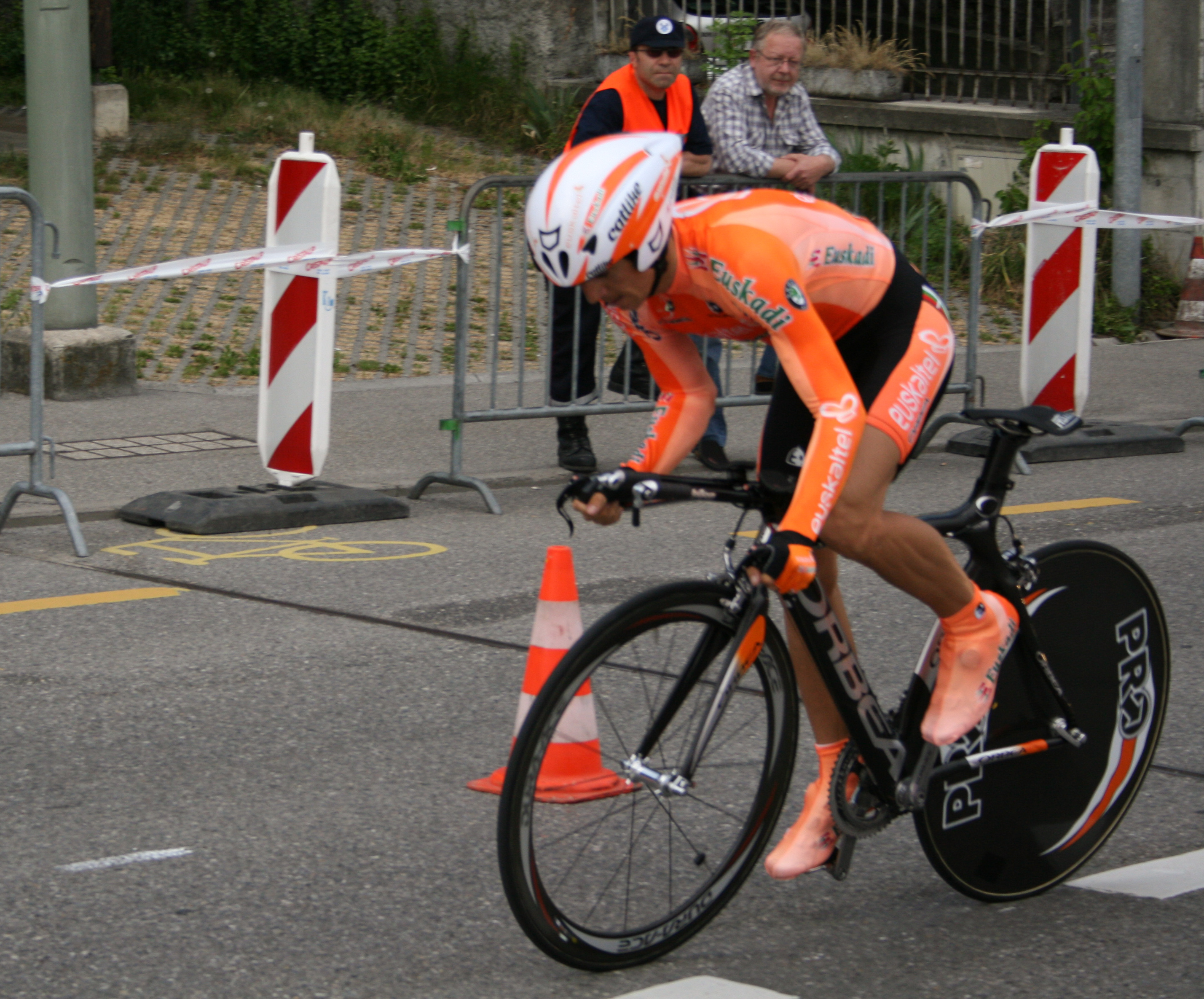 Jon Bru Pascal prologue du Tour de Romandie 2007